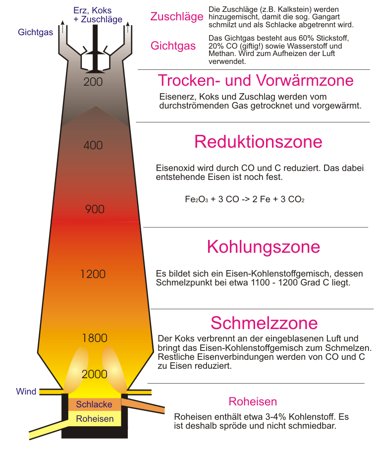 Schematische Darstellung des Hochofenprozesses